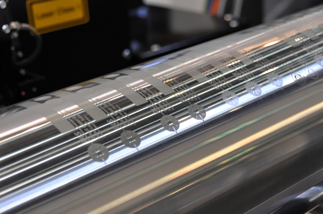 Bilder von der Drupa 2012 Drupa 2012